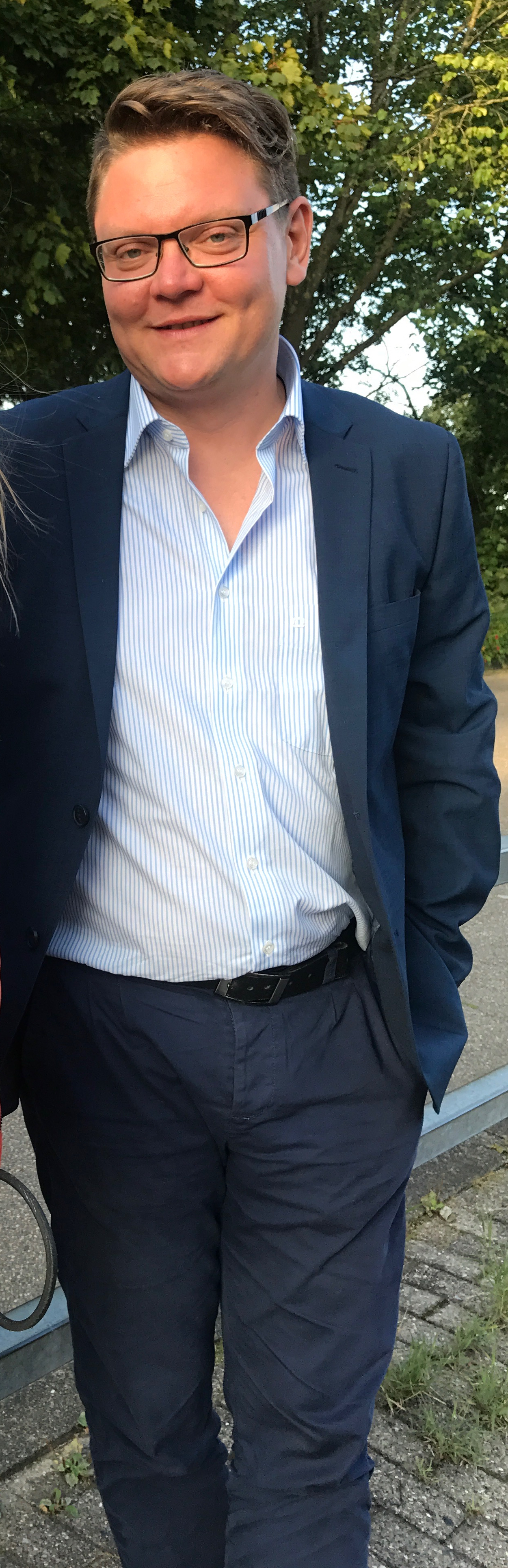 Foto Jan Diedrichsen